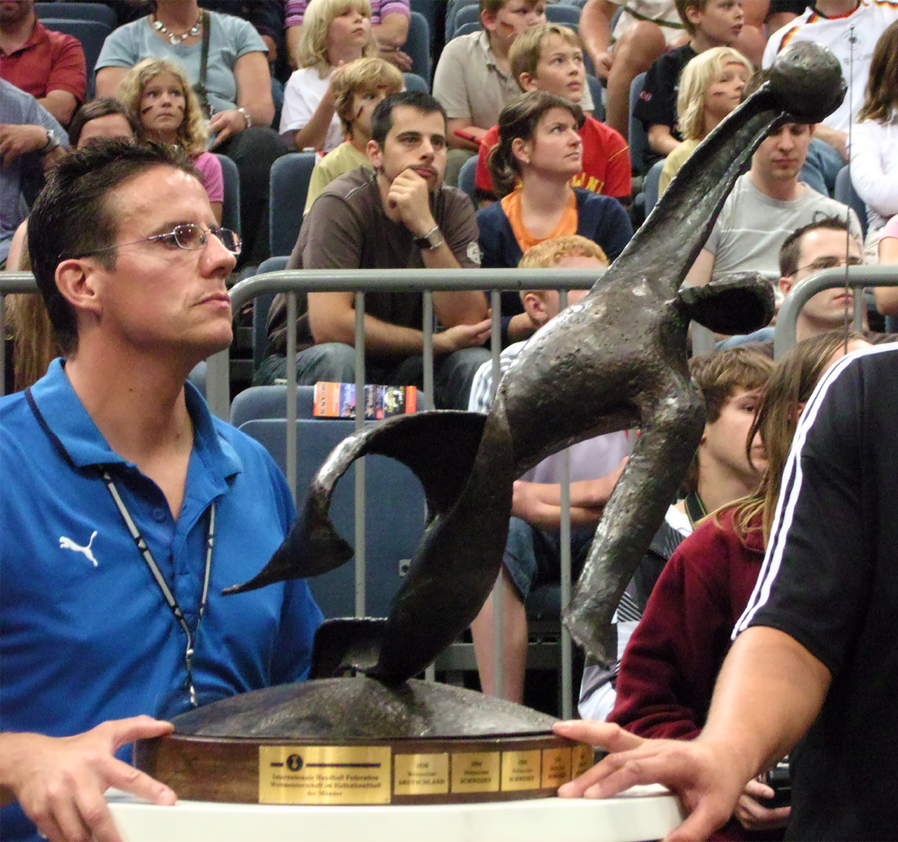 Der Handballweltpokal für den Handballweltmeister der Männer. Am 26. Juli 2008 in der Kölner Lanxess-Arena.